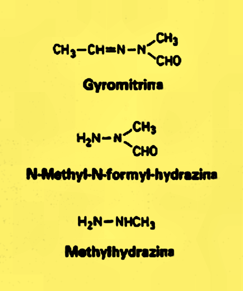 Gyiromitrin und Derivate